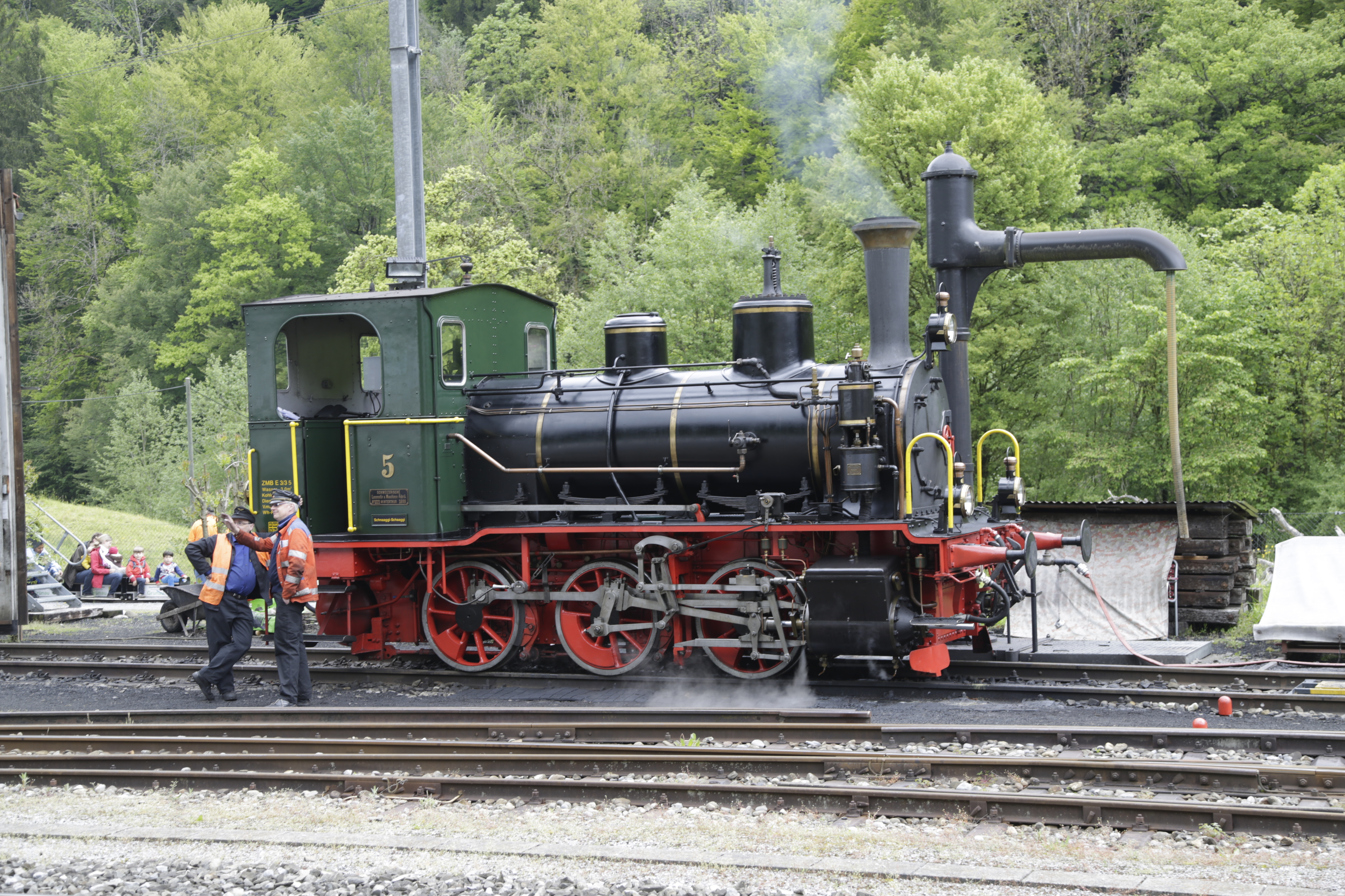 Die Sihltalbahn E 3/3 Nummer 5, als betriebsfähige Lokomotive der Zürcher Museumsbahn